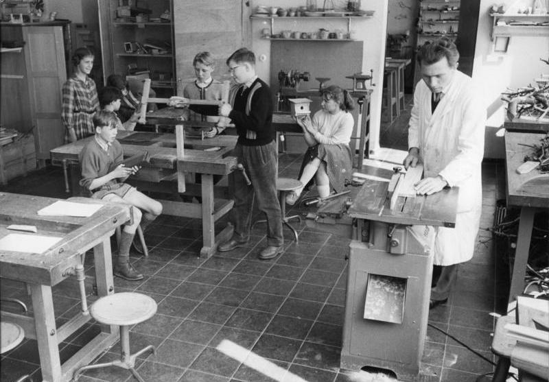 Jügenheim bei Seeheim, Schuldorf an der Bergstrasse (Werkunterricht) Den Kindern sollen keine trockenen Lehrsätze "eingepauckt" werden, in selbständiger Arbeit sollen sie sich mit den Bildungsgütern auseinandersetzten. Diesem Ziel dient der Gruppenunterricht. Hier berichtet der Gruppensprecher einer Gruppe der Klasse über die geleistete Arbeit. Information added by Wikimedia users.Schuldorf Bergstraße in Seeheim-Jugenheim, Hessen